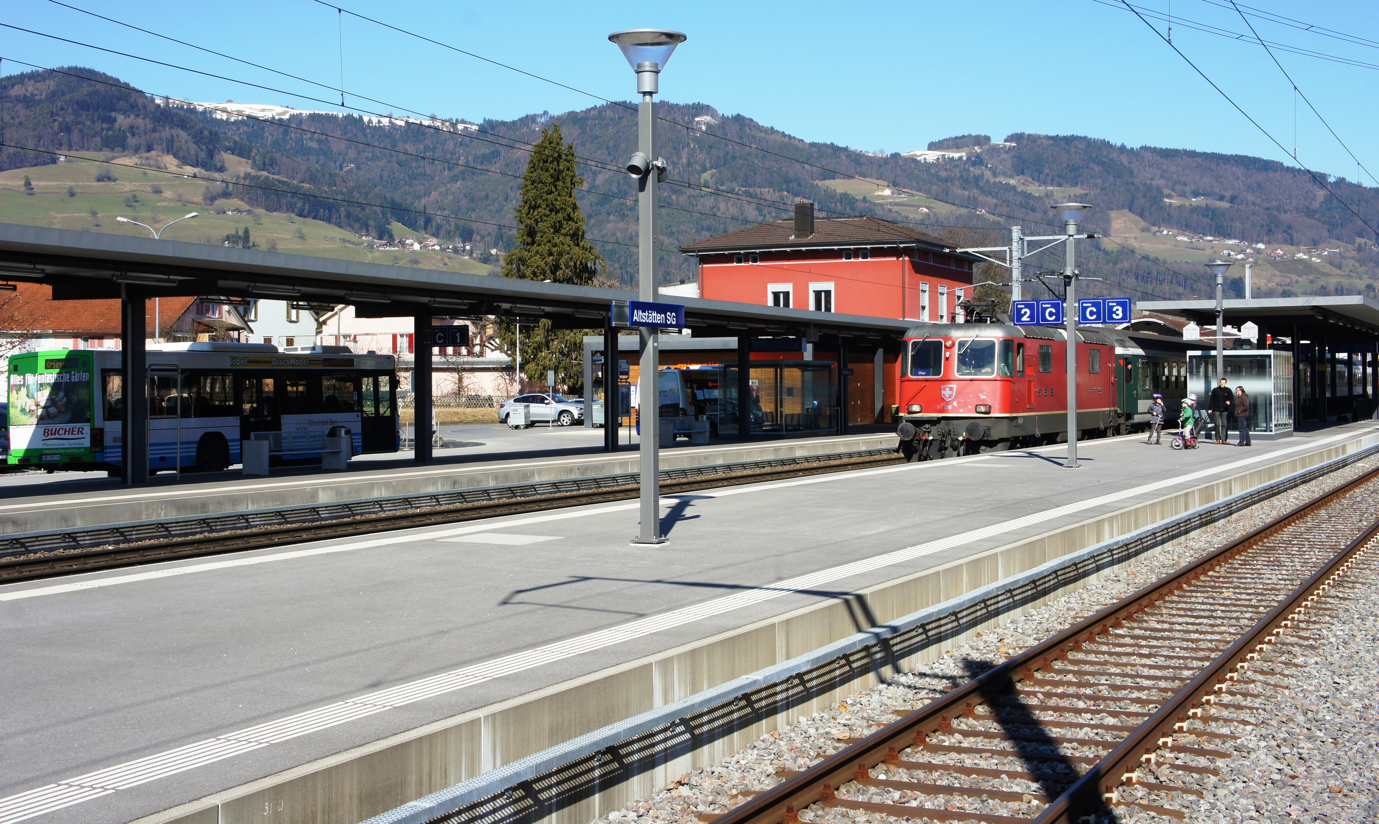 Blick von Süden auf den Bahnhof Altstätten SBB.